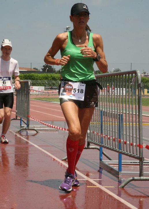 Eva Esnaola